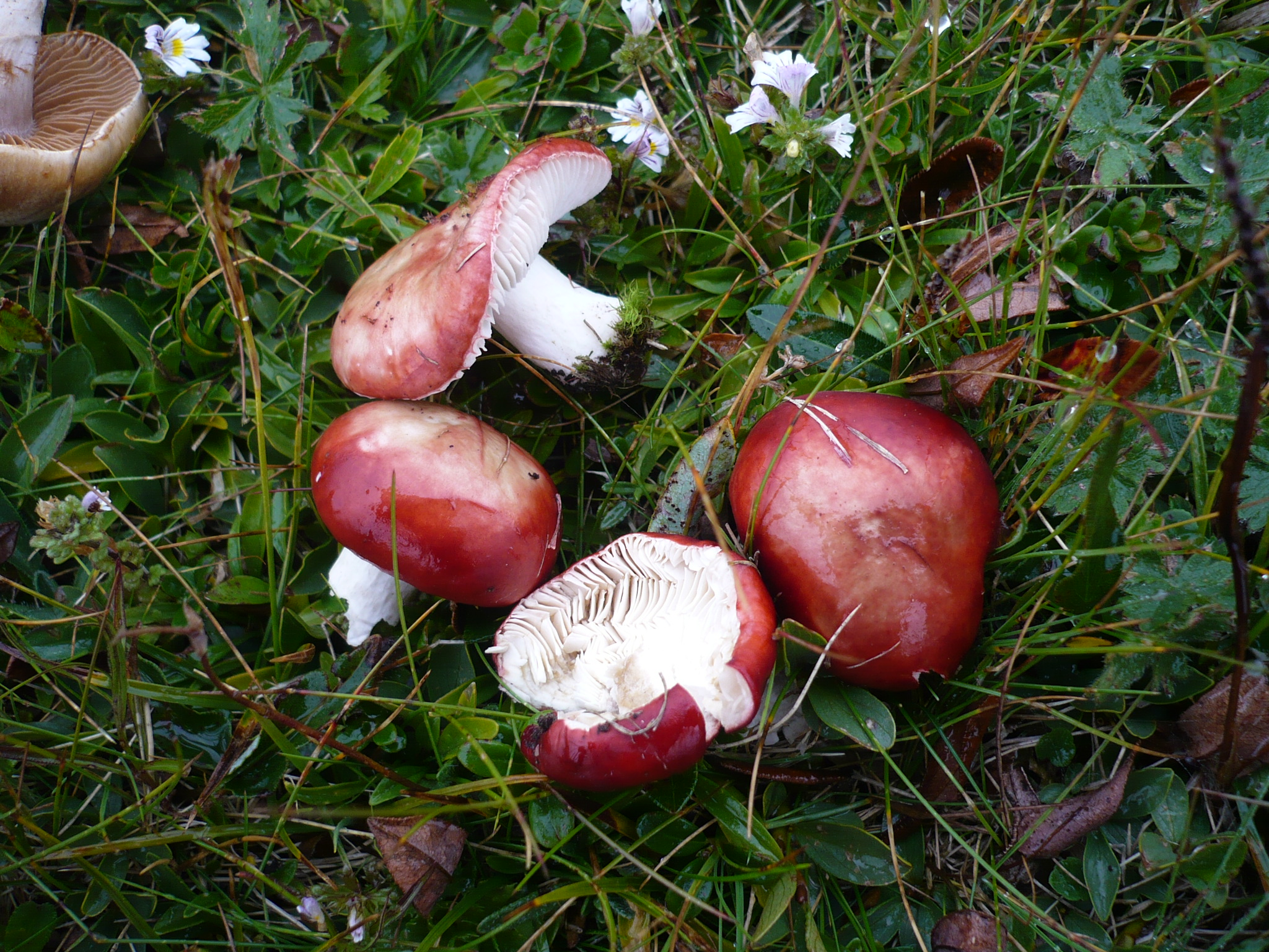 Russula nana Killerm.